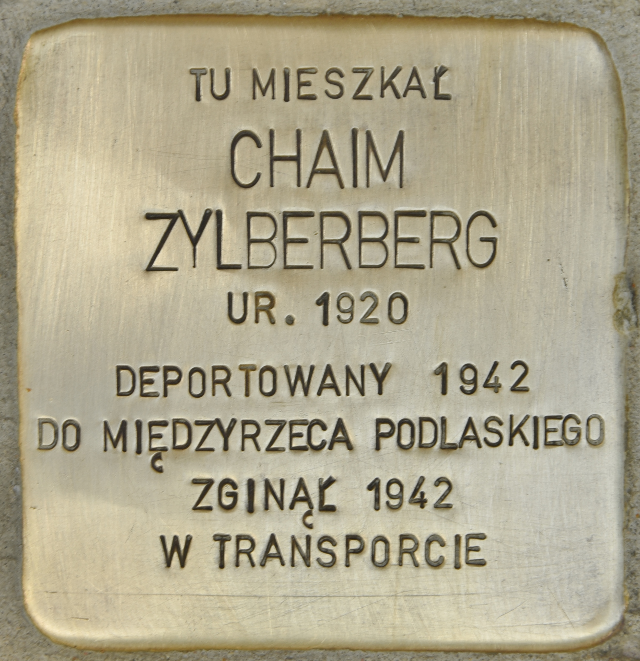 Stolperstein für Chaim Zylberberg, Krótka 3